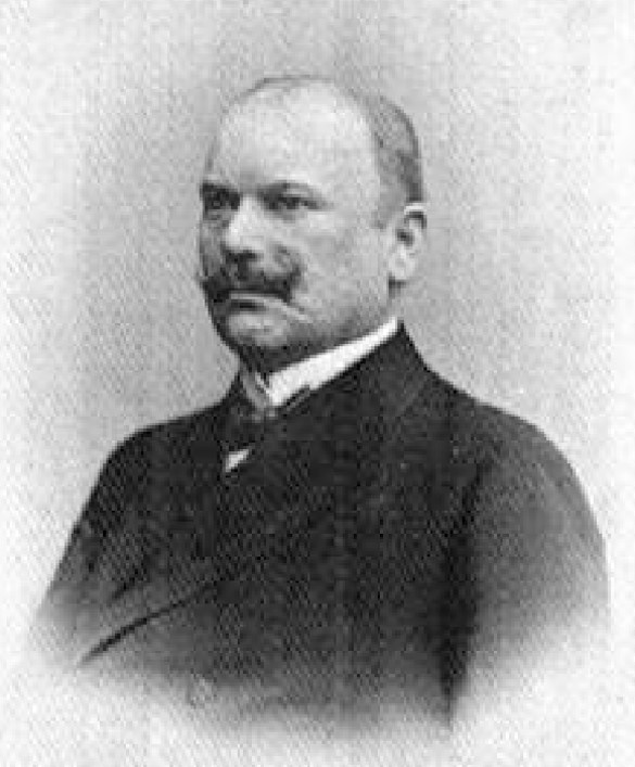 Eugen von Brockhausen (* 10. März 1857 in Karwitz; † 1923) Abgeordneter der Deutsch-Konservativen Partei